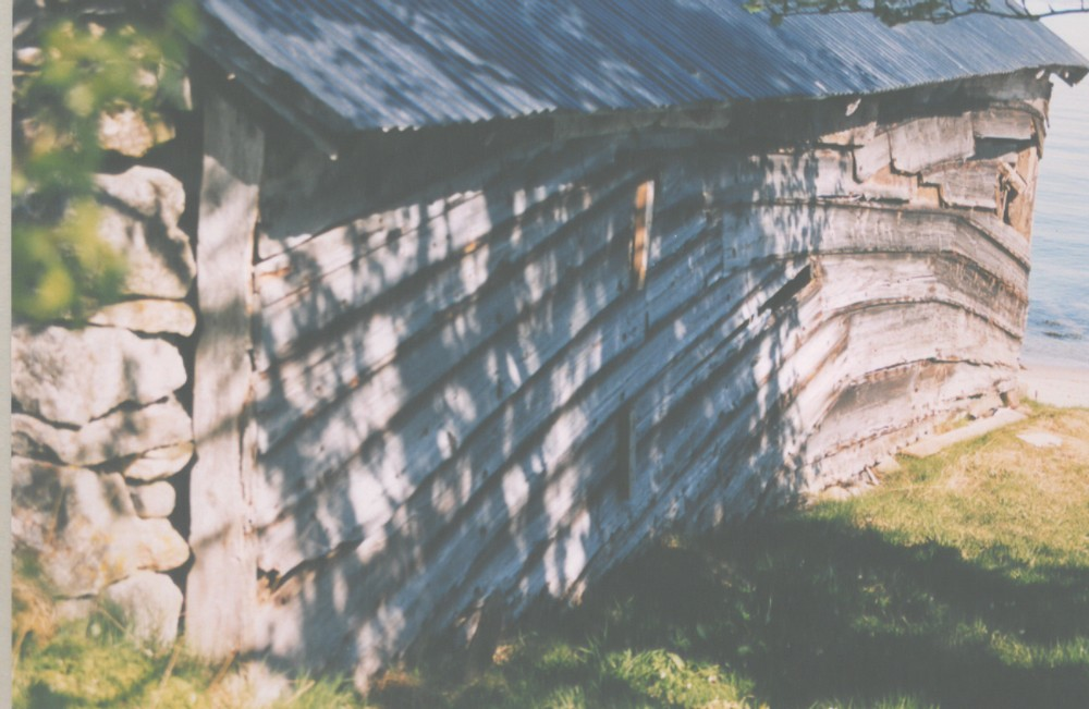 Gamal snidbetningside (åttring) fotografert på gamalt naust på Hareid